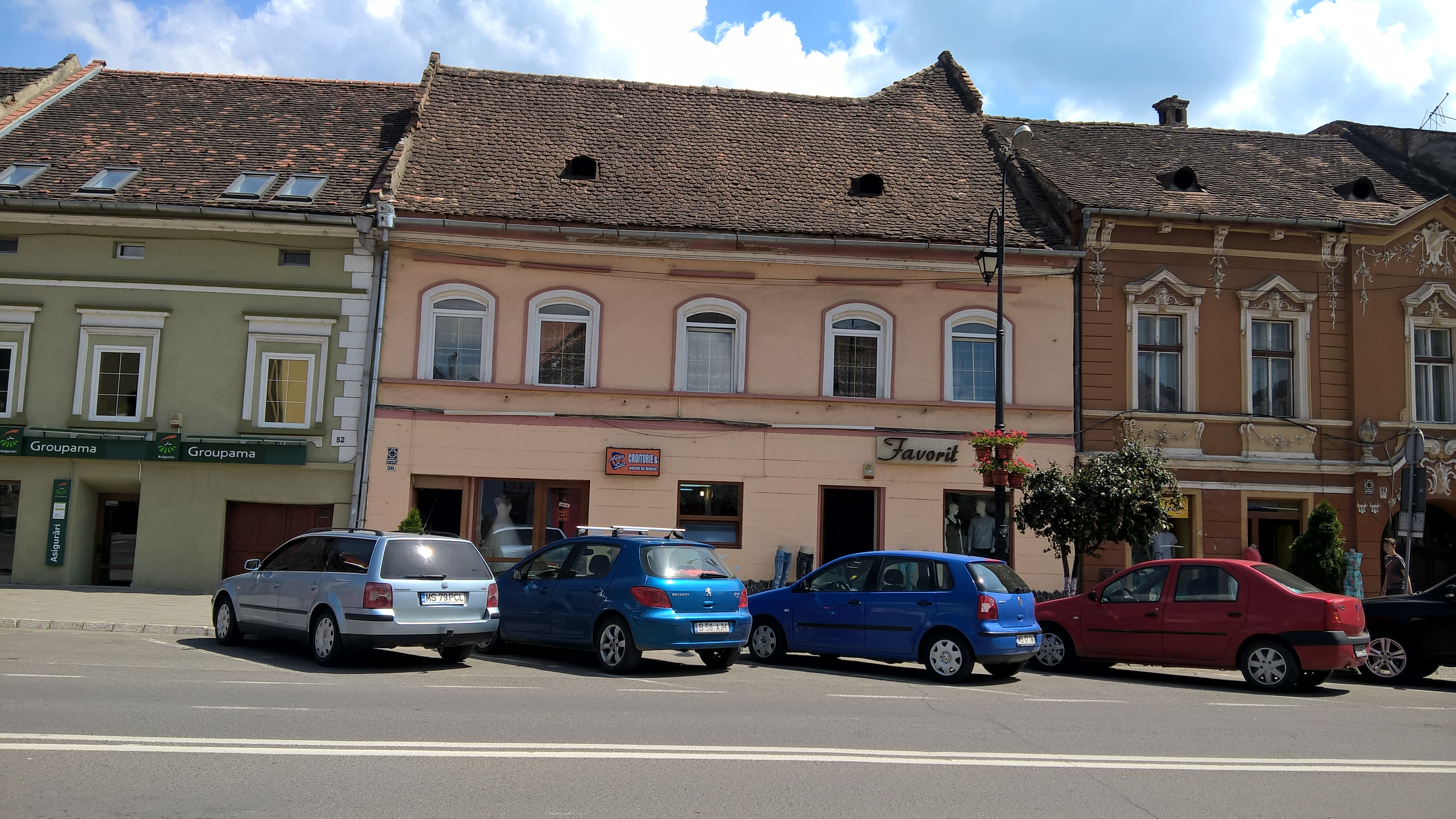 Casă Centrul istoric Sighisoara